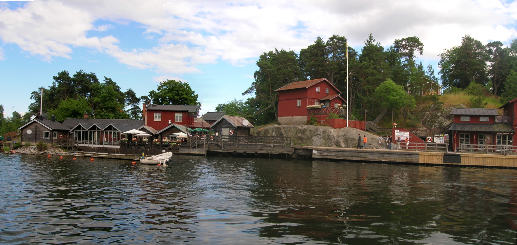 Fjäderholmarna, Lidingö, Sweden.